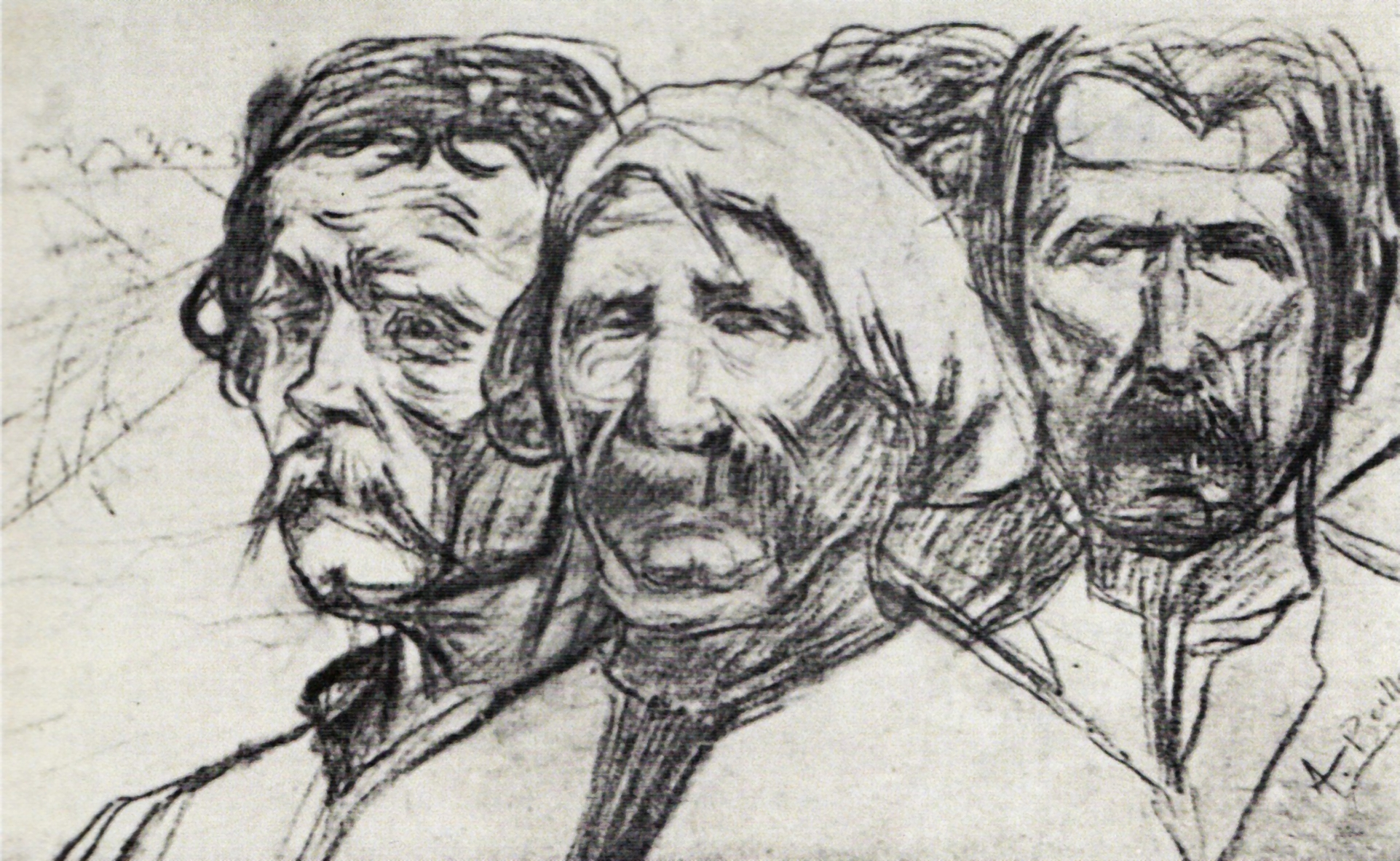 Durus arator - Schiță